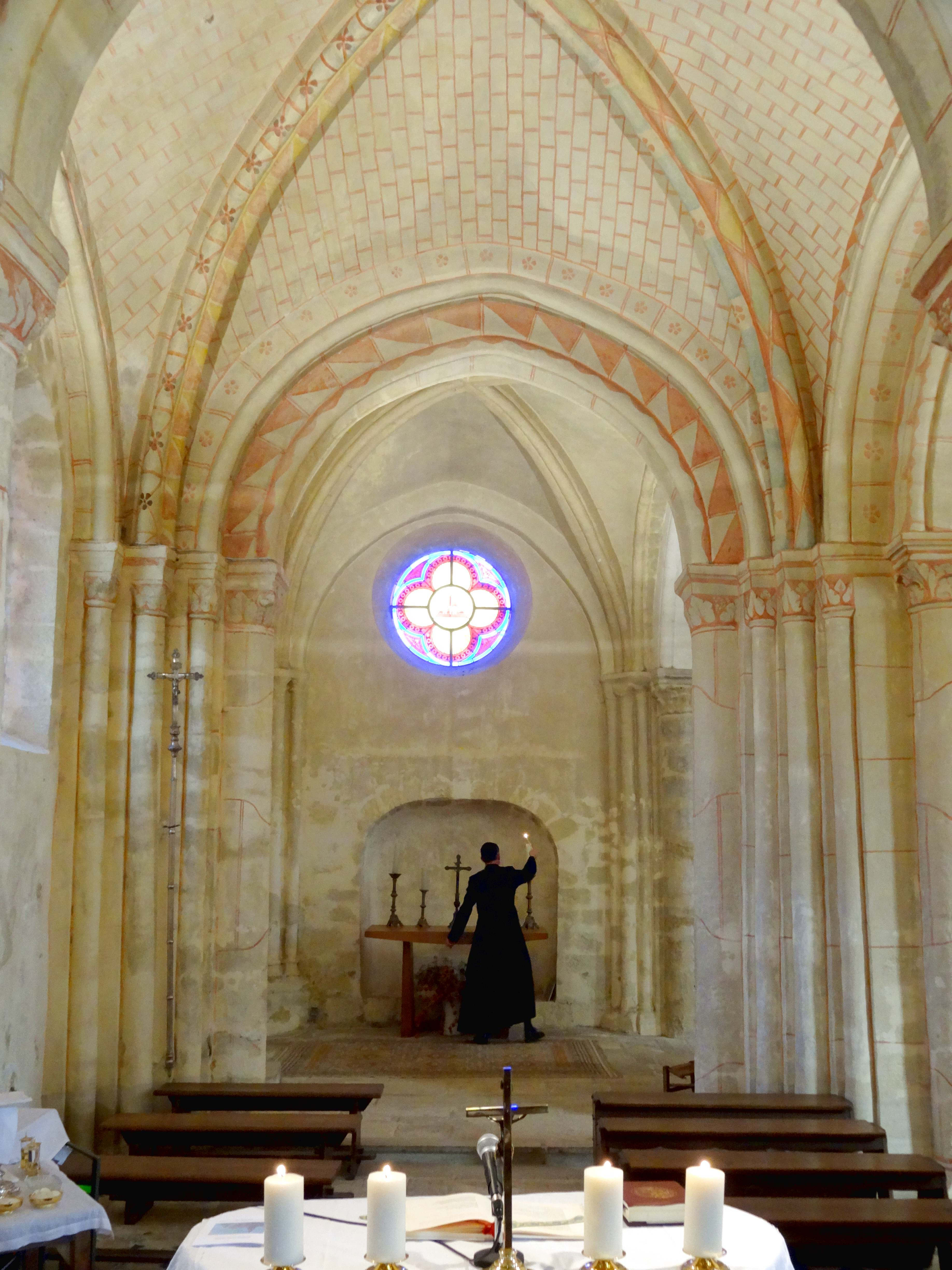 Intérieur de l'église - voir titre.